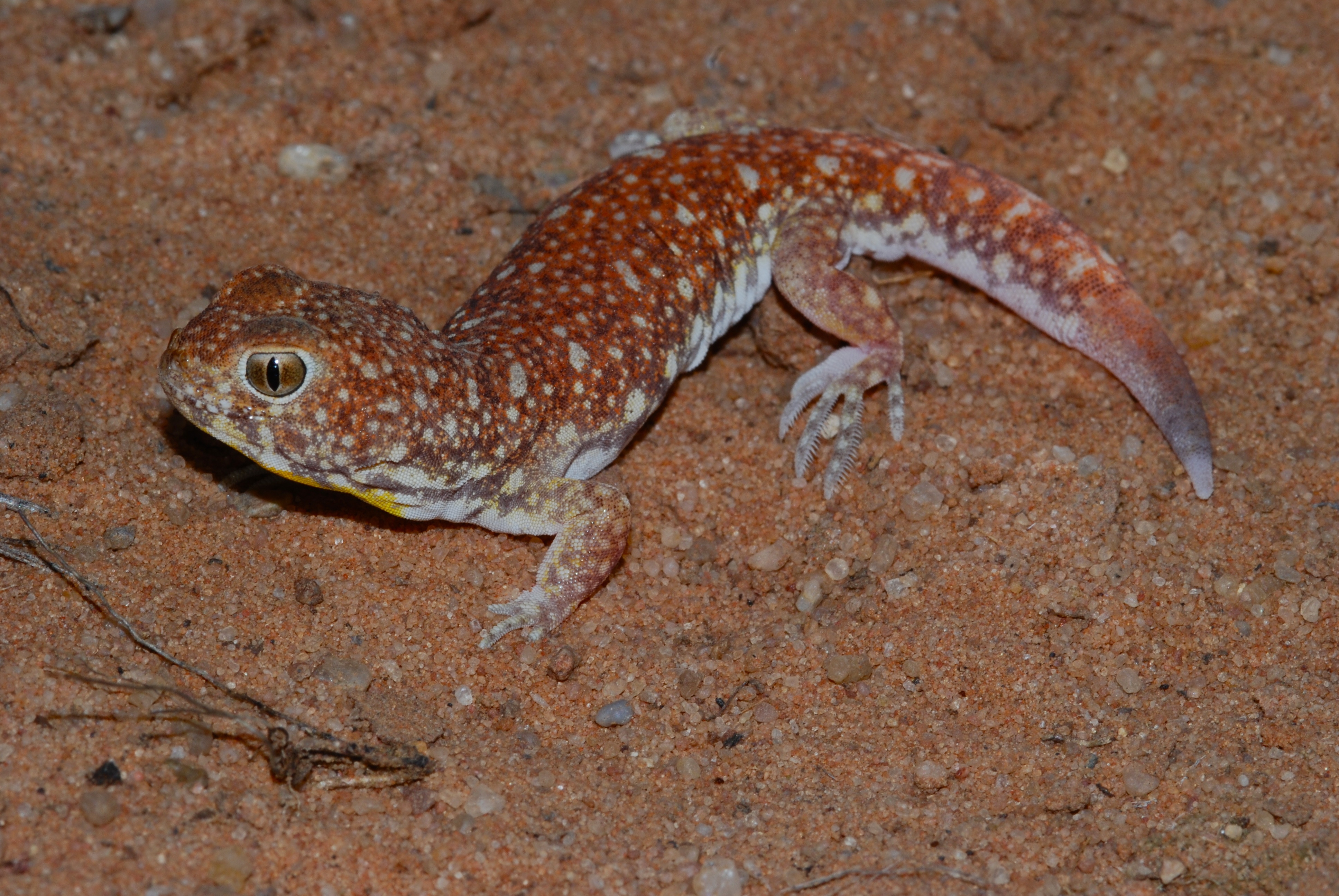 Mata-Mata Camp, Kgalagadi Transfrontier Park, SOUTH AFRICA